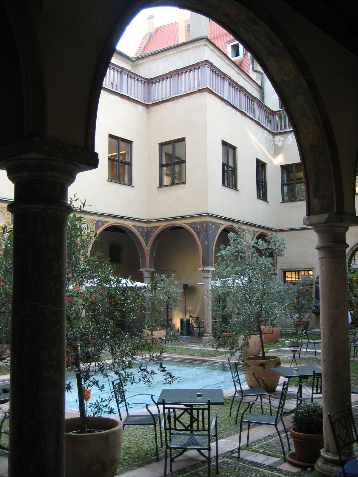 Fuggerhäuser in Augsburg an der Maximilianstraße, Blick in den Damenhof